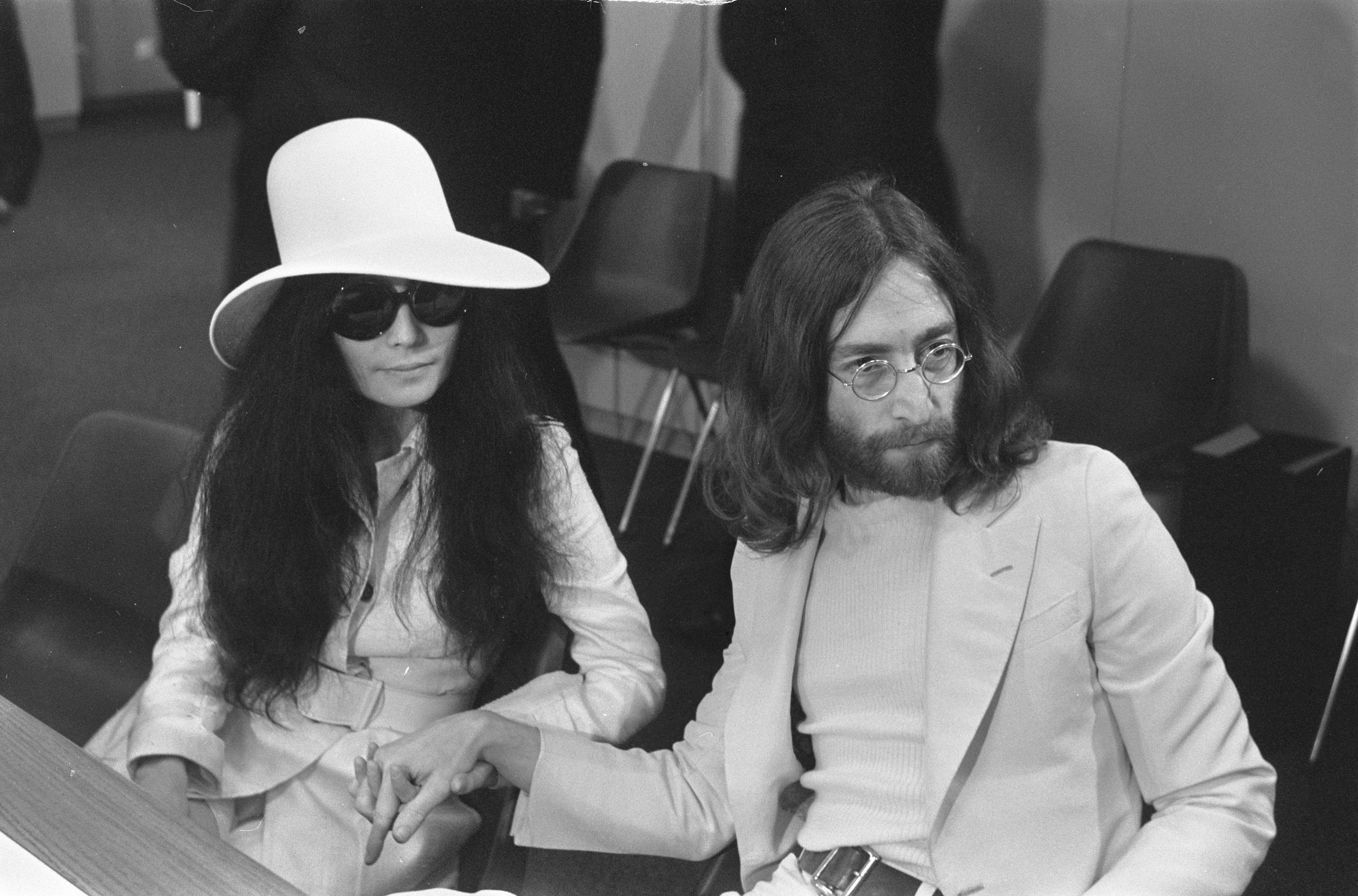 Collectie / Archief : Fotocollectie Anefo Reportage / Serie : [ onbekend ] Beschrijving : John Lennon en echtgenote Yoko Ono vertrekken van Schiphol naar Wenen in de vertrekhal Datum : 31 maart 1969 Locatie : Noord-Holland, Schiphol Trefwoorden : echtparen, huwelijksreizen, musici, vliegvelden, zangers Persoonsnaam : Lennon, John, Ono, Yoko Fotograaf : Evers, Joost / Anefo Auteursrechthebbende : Nationaal Archief Materiaalsoort : Negatief (zwart/wit) Nummer archiefinventaris : bekijk toegang 2.24.01.05 Bestanddeelnummer : 922-2499